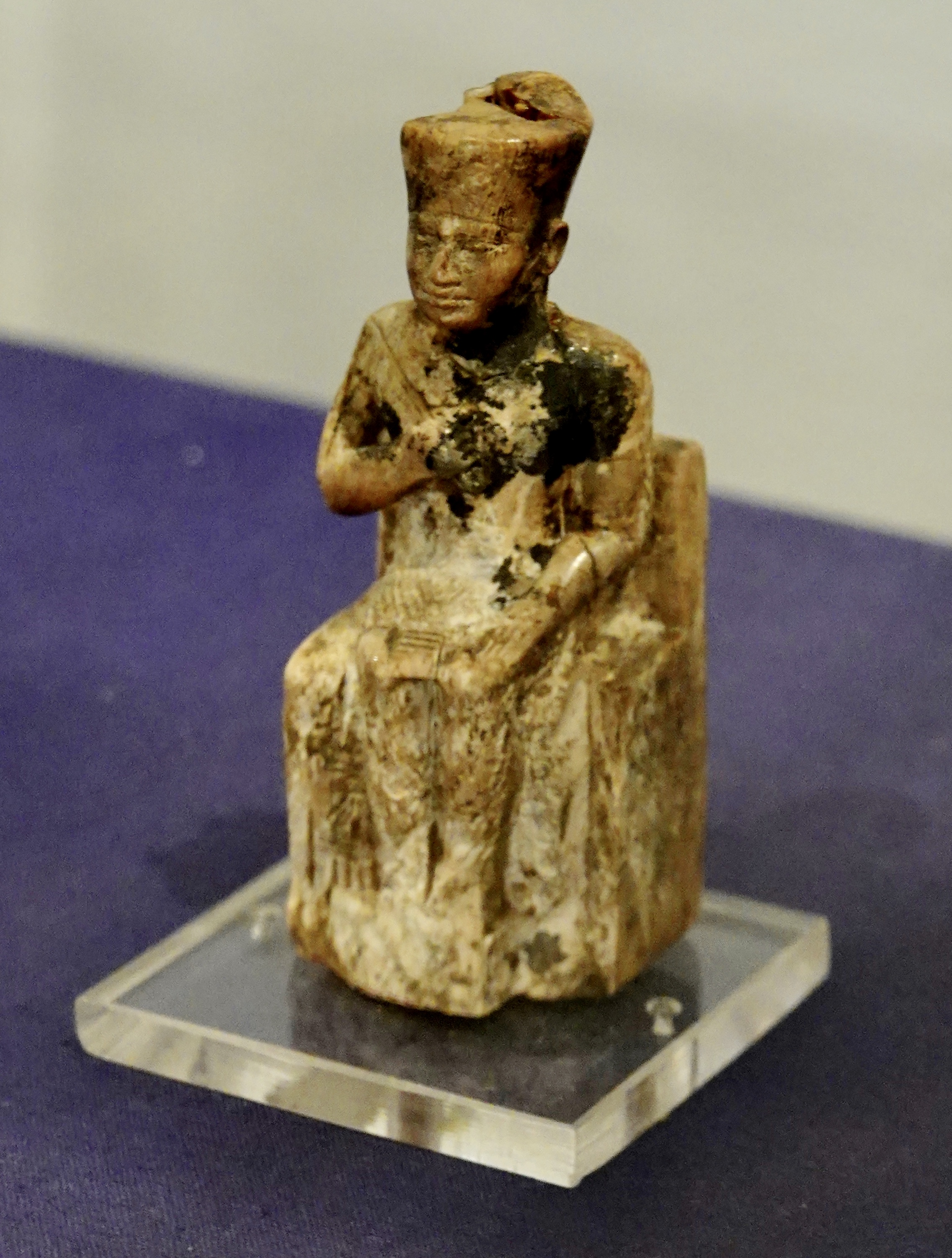 Statuette des sitzenden Königs Cheops der 4. altägyptischen Dynastie (Höhe: 7,5 cm, Breite: 2,5 cm, Tiefe: 2,9 cm), gefunden 1903 in Abydos, ausgestellt im Ägyptischen Museum in Kairo, Ägypten